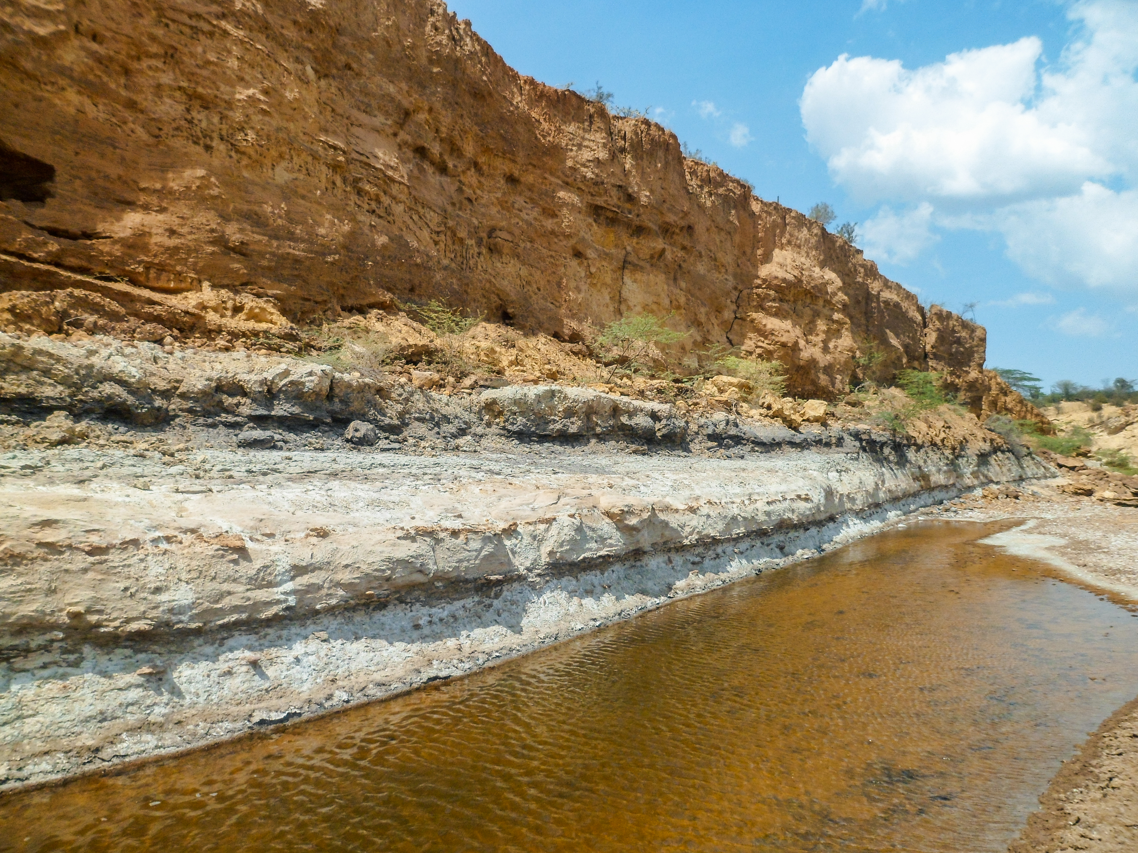 Parte del río Urumaco.